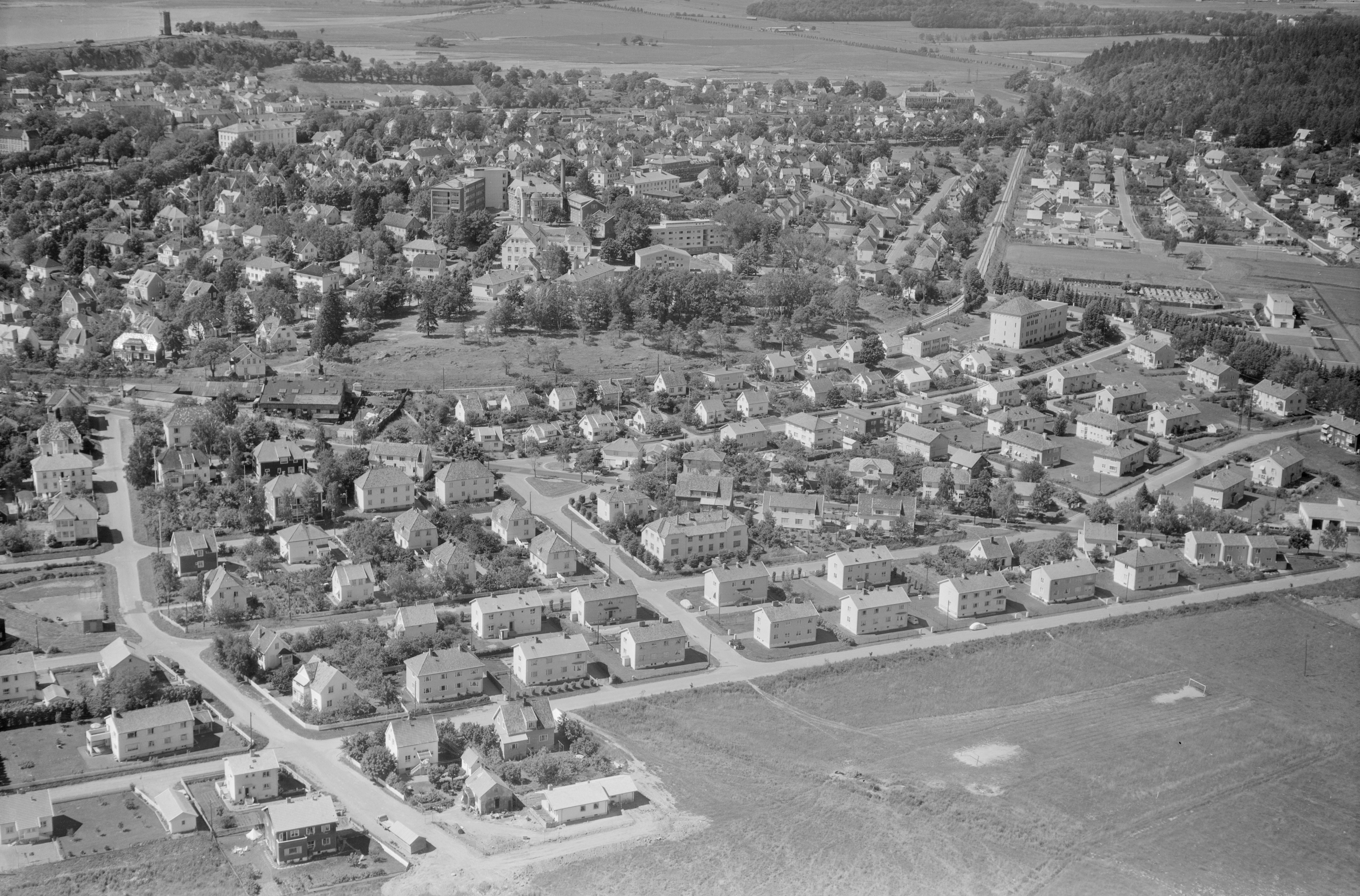 FW.S.A.1057 (datering usikker)